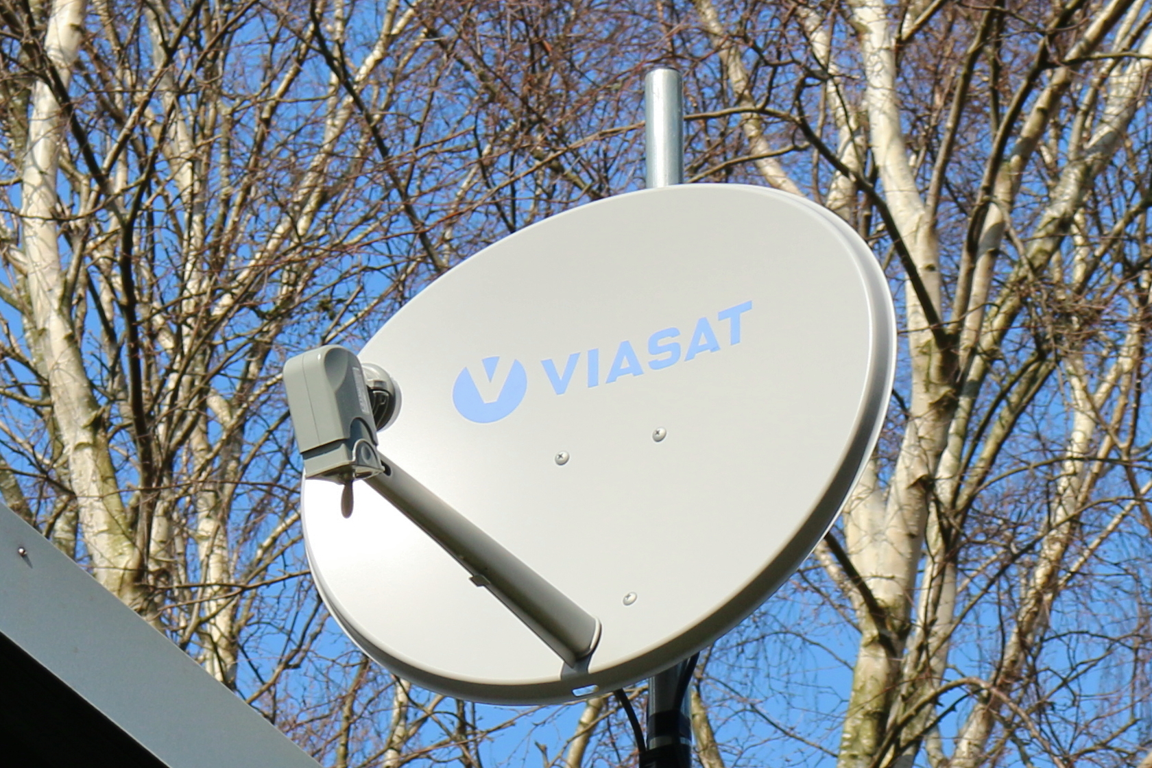 Parabolantenn från Viasat